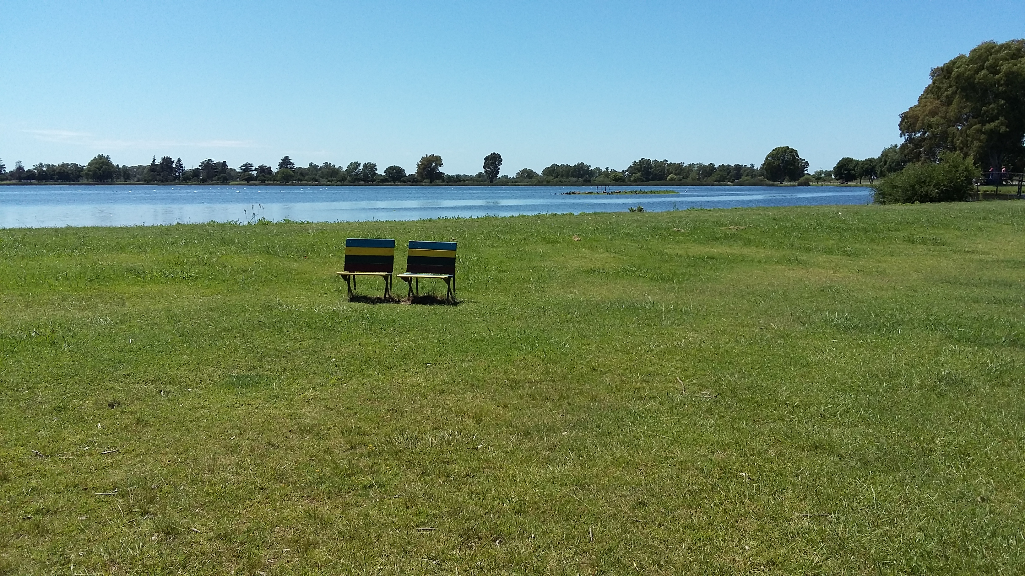 La Laguna del Parque Plaza Montero ofrece un lugar para el descanso, en contacto con la naturaleza.